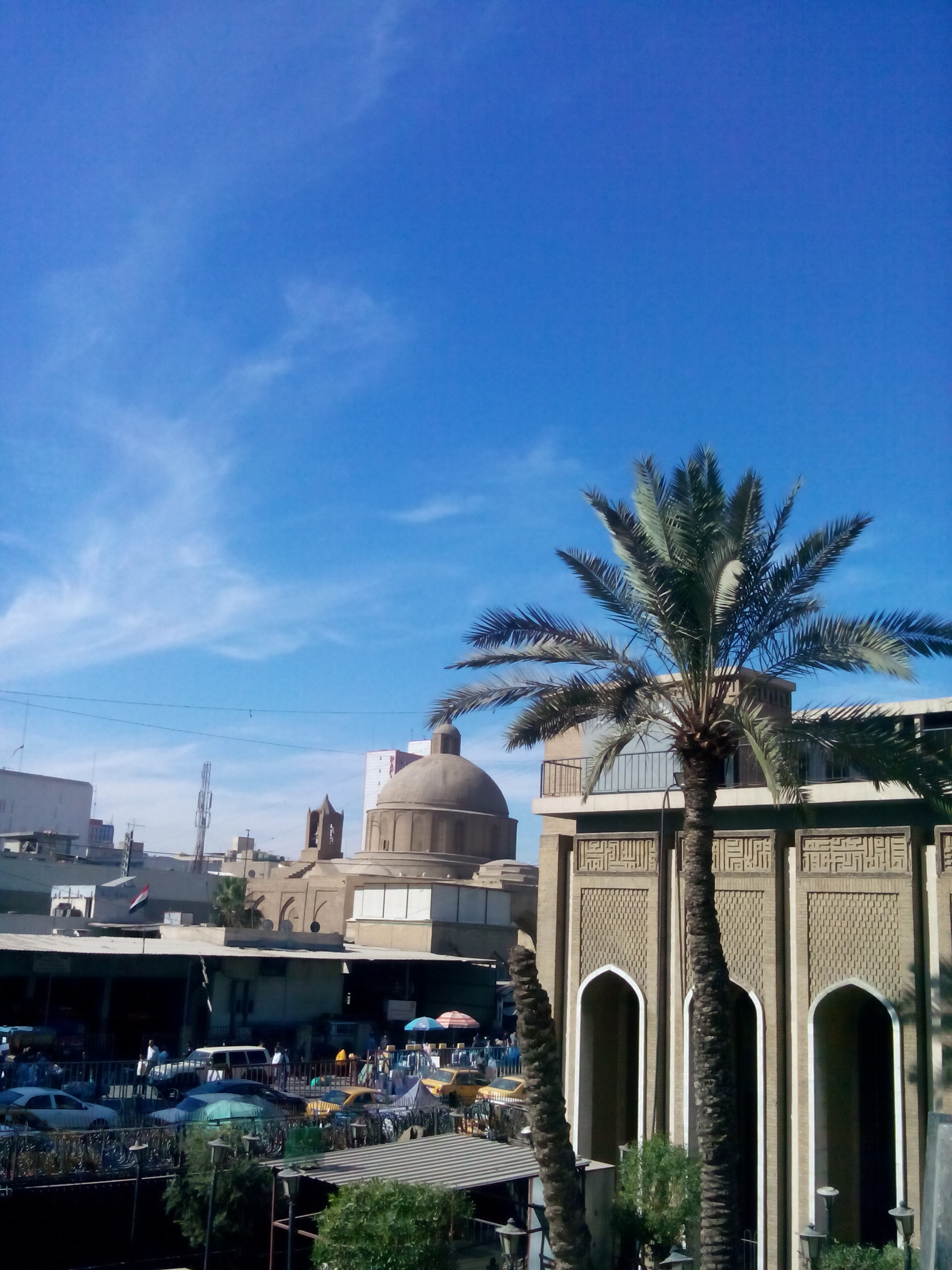 جامع الخلفاء في بغداد ويقع في شارع الجمهورية قرب سوق الغزل في الشورجة، وتظهر في وسط الصورة قبة كنيسة أم الأحزان للكلدان التي تقع مقابل الجامع عبر الشارع ويظهر جزء من المبنى الحديث لجامع الخلفاء من جهة يمين الصورة